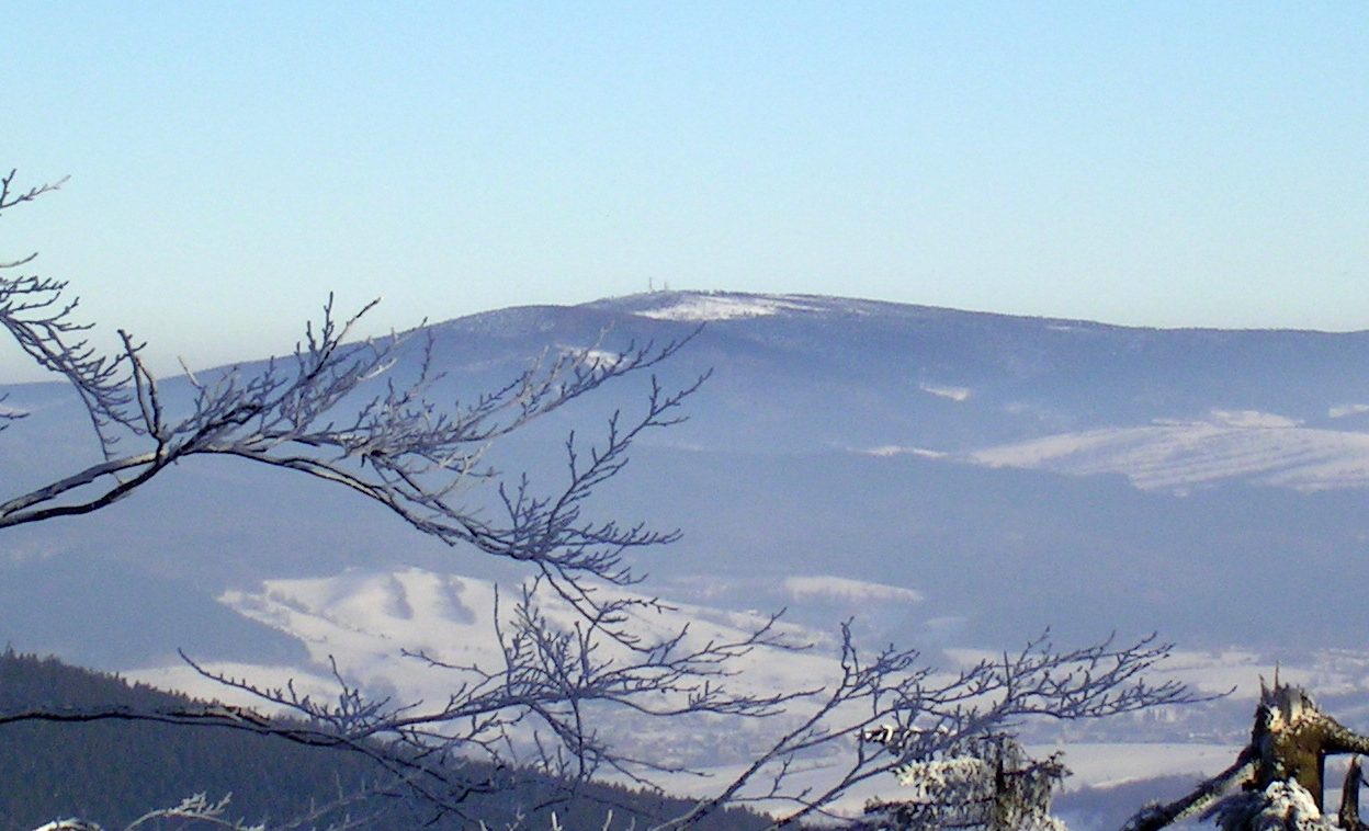 Wielka i Mała Sowa - widok od strony Waligóry